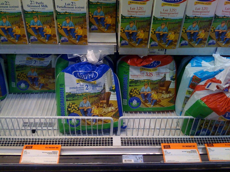 Feels like home. @ IGA, St Jean, PQ